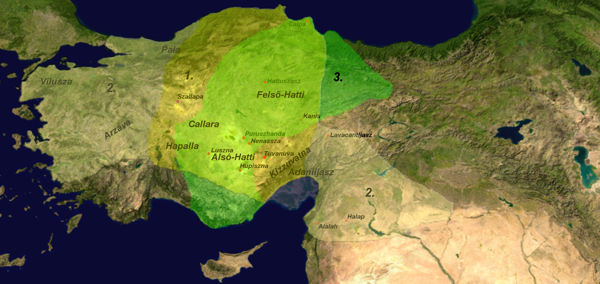 Anatólia a korahettita korban. Térkép. Jelmagyarázat 1 = Labarnasz; 2 = I. Hattuszilisz; 3 = Telepinusz uralkodása idején